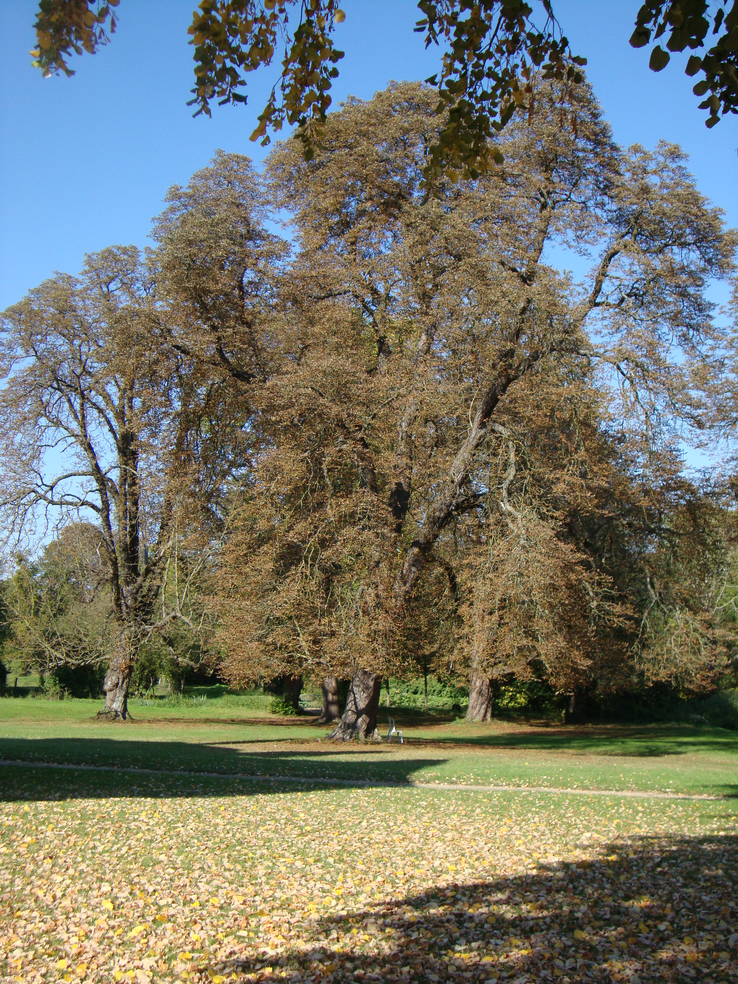 Parc du château de Brou-sur-Chantereine .